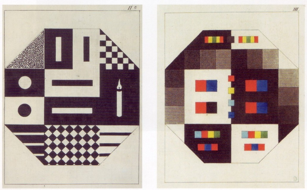 Johann Wolfgang von Goethe: "Tafel Ft III zur Farbenlehre".